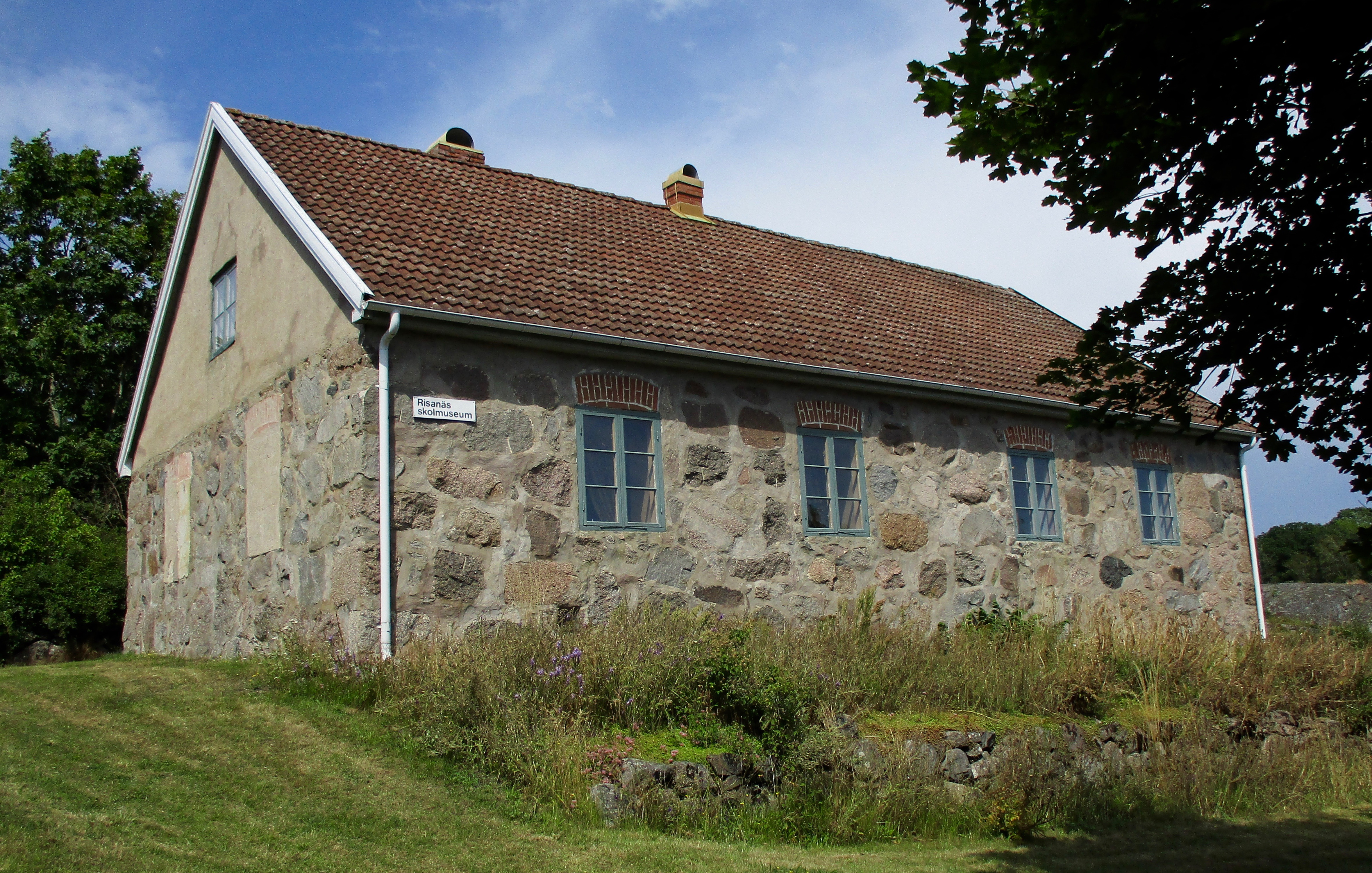 Risanäs Skolmuseum, Ronneby.